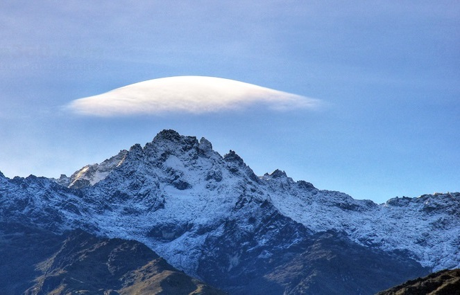 Vista del Pico Bolívar, Mérida, Venezuela